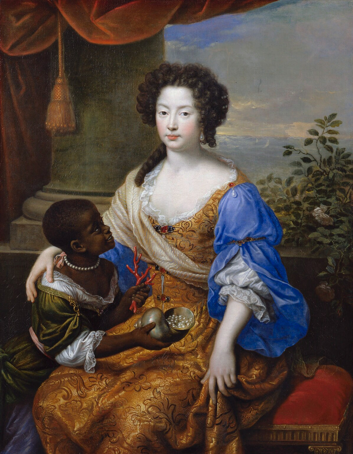 Portrait de Louise de Keroual, duchesse de Portsmouth